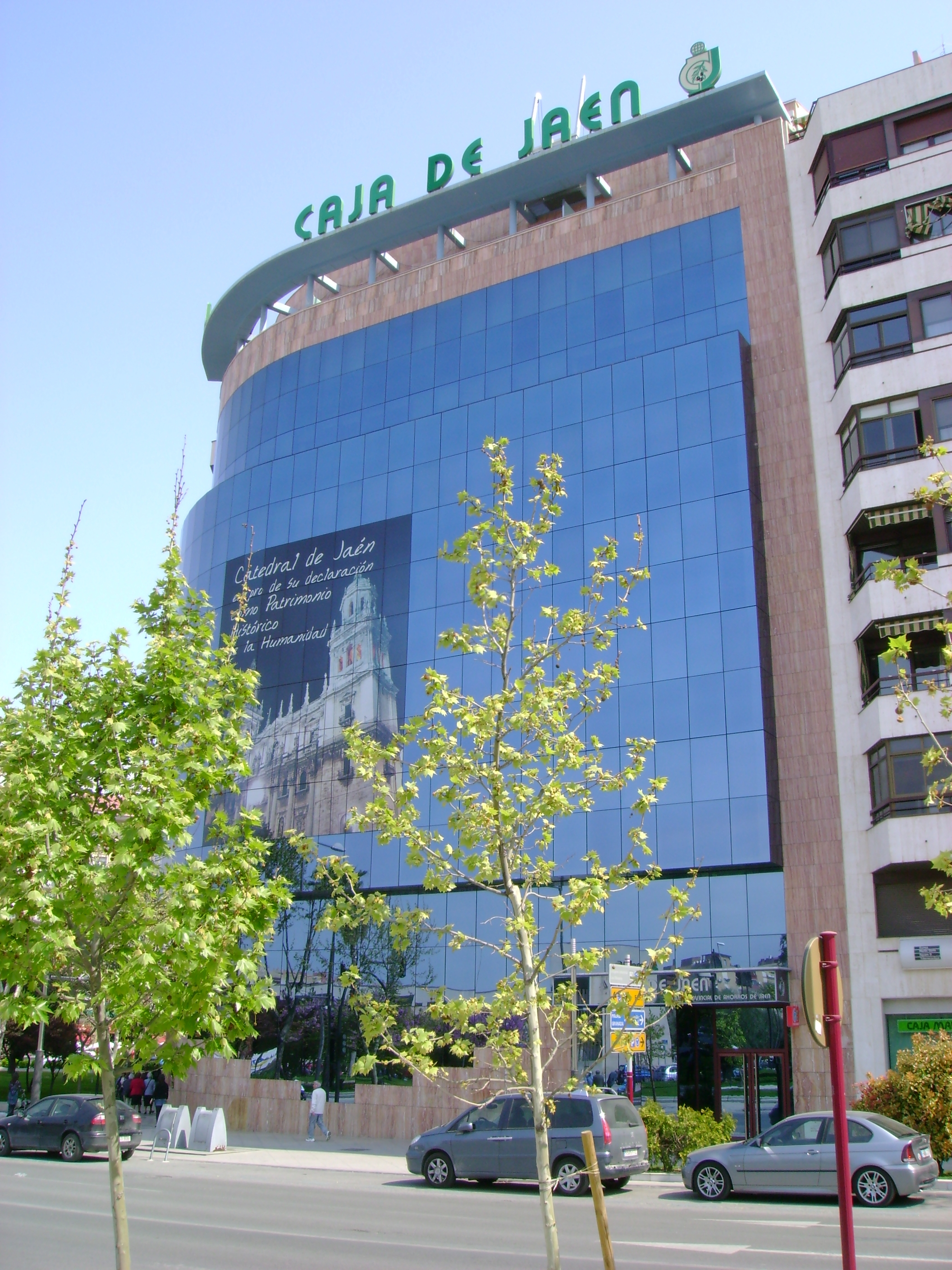 Edificio de la Caja de Jaén en la Plaza de Jaén por la Paz, Jaén.